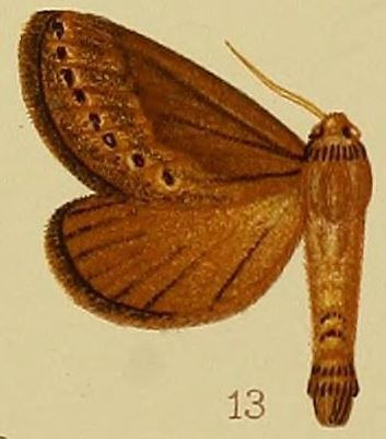 Eudalaca stictigrapha